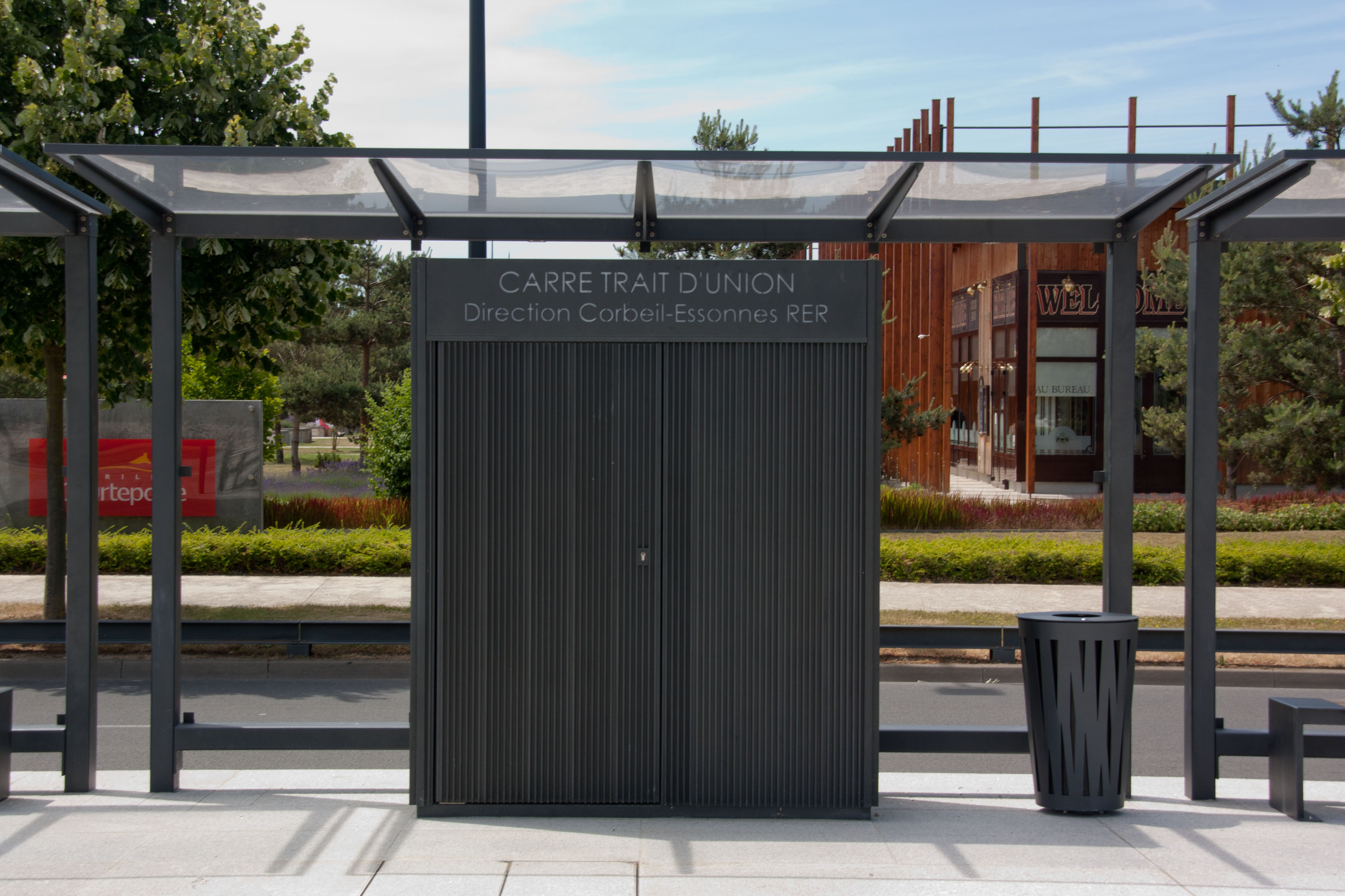 T-ZEN Ligne 1 - station de la ligne - Département de l'Essonne et de Seine-et-Marne